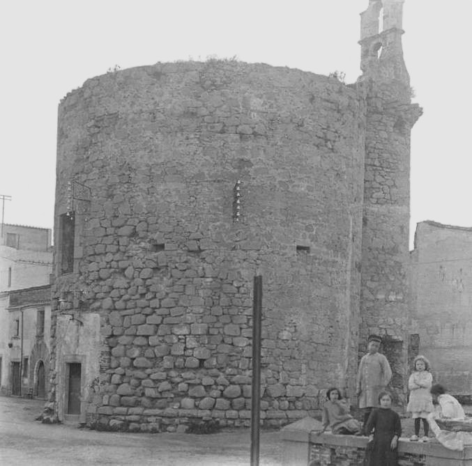 Torre de vigilància de Canet de Mar. Josep Salvany i Blanch (1913)